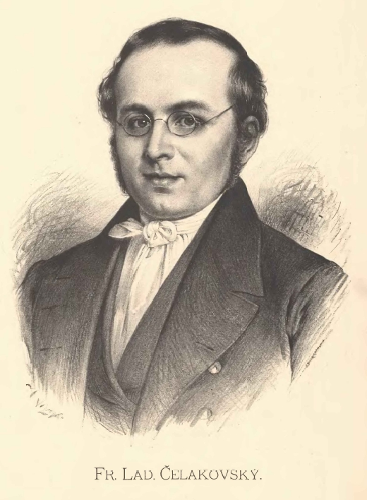 František Ladislav Čelakovský (1799-1852), český básník